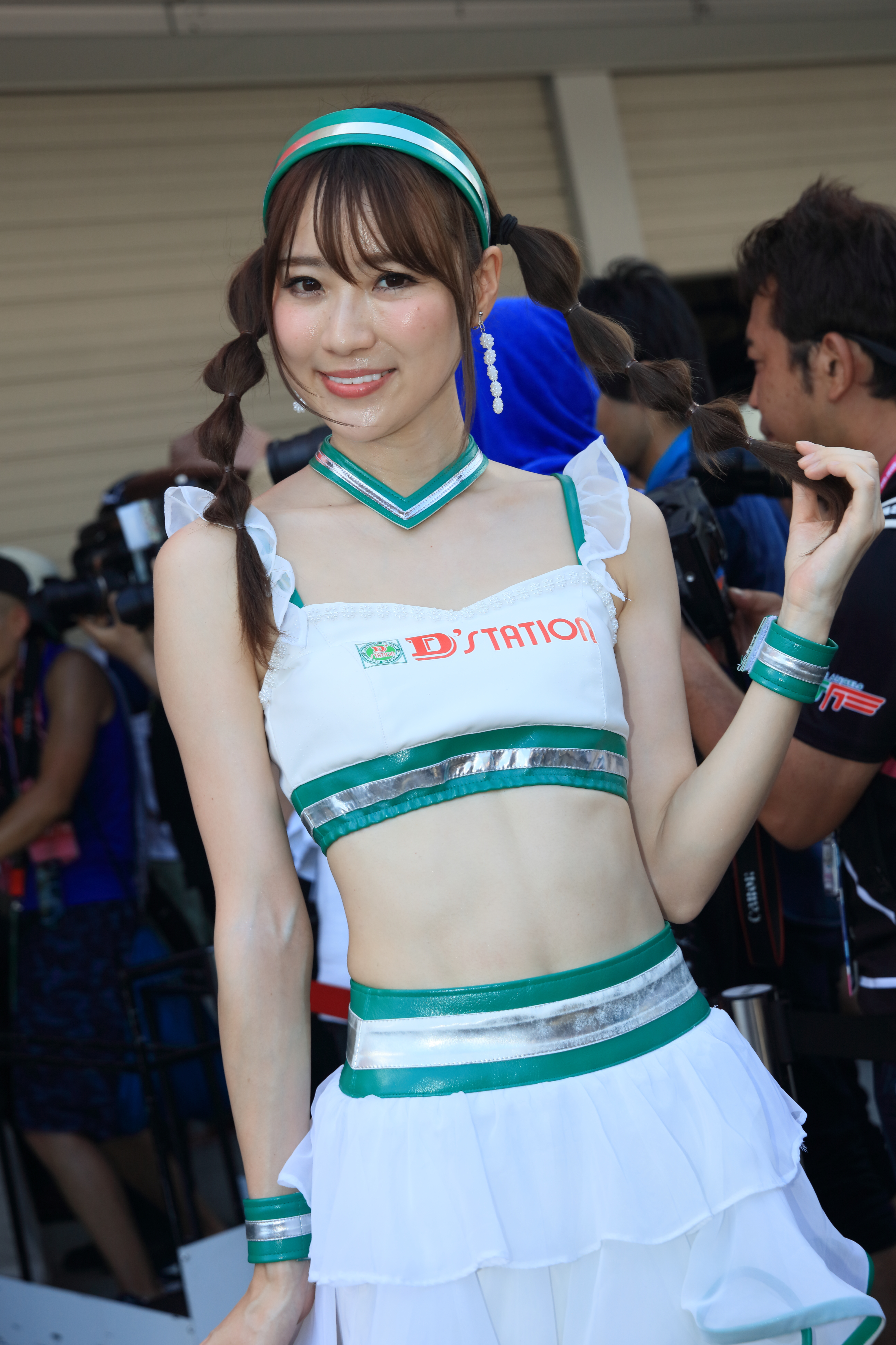 2018年8月25日 鈴鹿サーキット